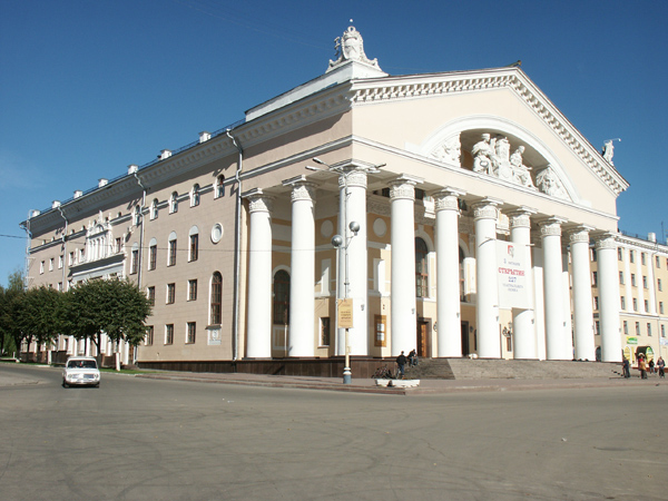 Калужский областной драматический театр